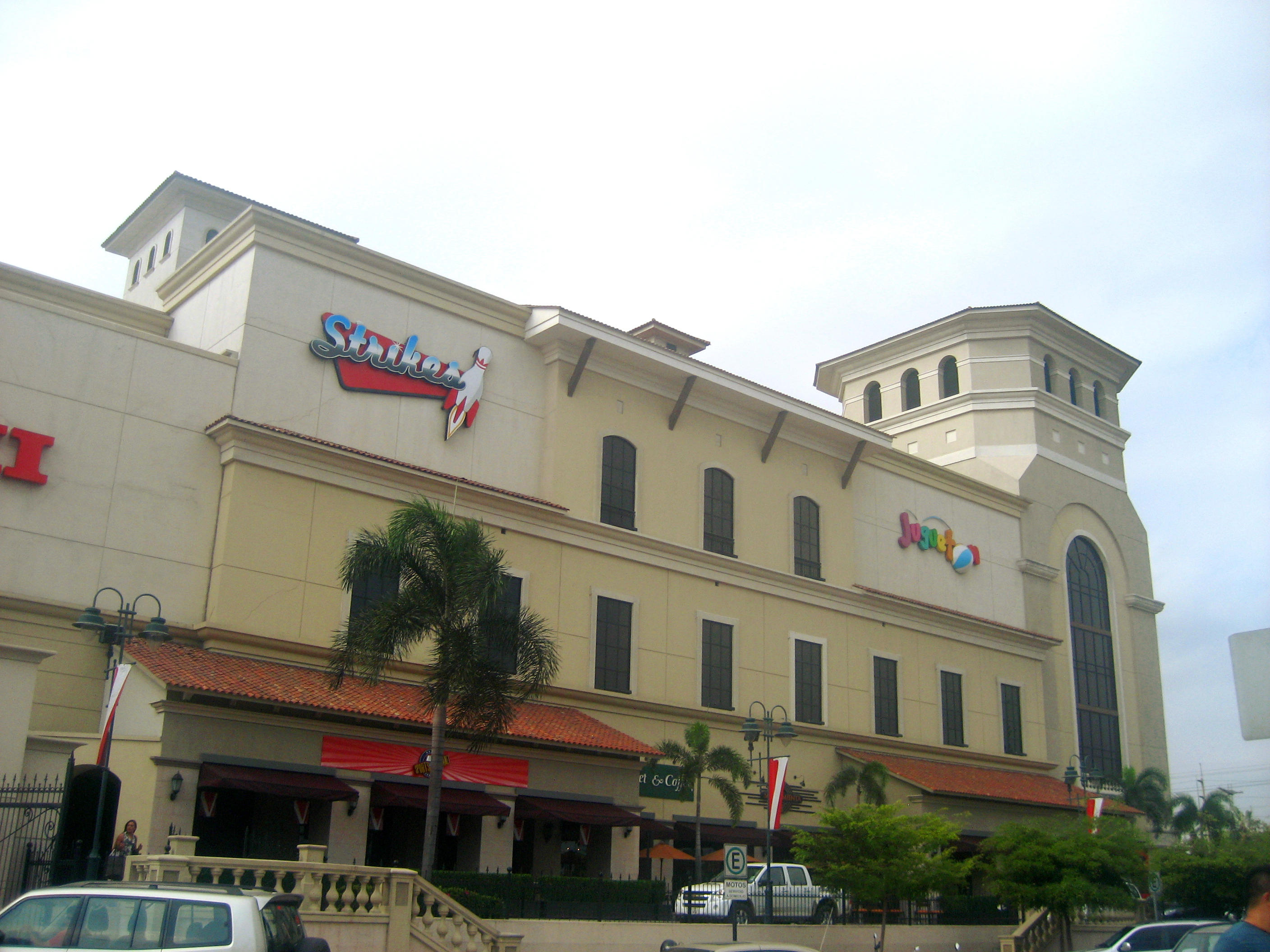 Foto del centro comercial Village Plaza